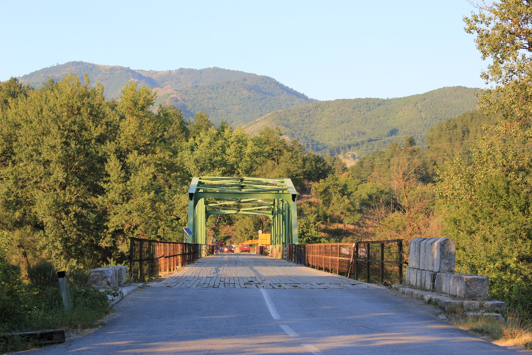 Grenzbrücke zwischen Bosnien und Serbien über den Lim bei Rudo.Hornjoserbsce: Namjezny móst mjez Bosniskej a Serbiskej přez rěku Lim blisko Rudoho.